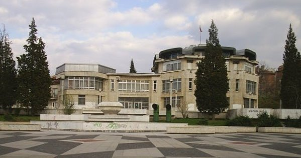 Градска библиотека "Паисий Хилендарски" - Асеновград